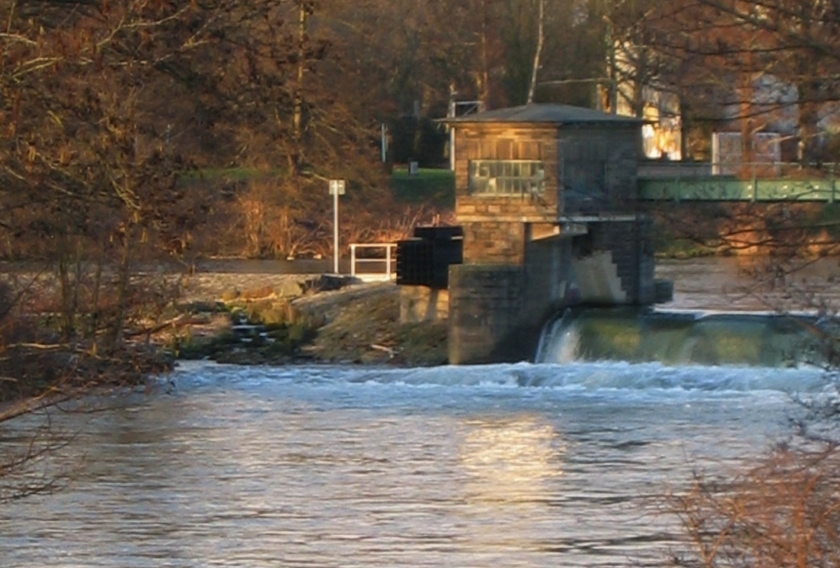 Das Stauwehr „Stiftsmühle“ in der Ruhr direkt an der Stadtgrenze zwischen Herdecke und Hagen (bis 1964 gehörte das gesamte Wehr zum Stadtgebiet von Herdecke). Blick vom Hagener Ufer in Richtung Herdecke. Links von dem „Turm“ ist die Fischaufstiegsanlage zu erkennen.